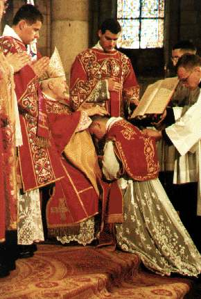 Ordination d'un prêtre en l'abbaye de Fontgombault (France)